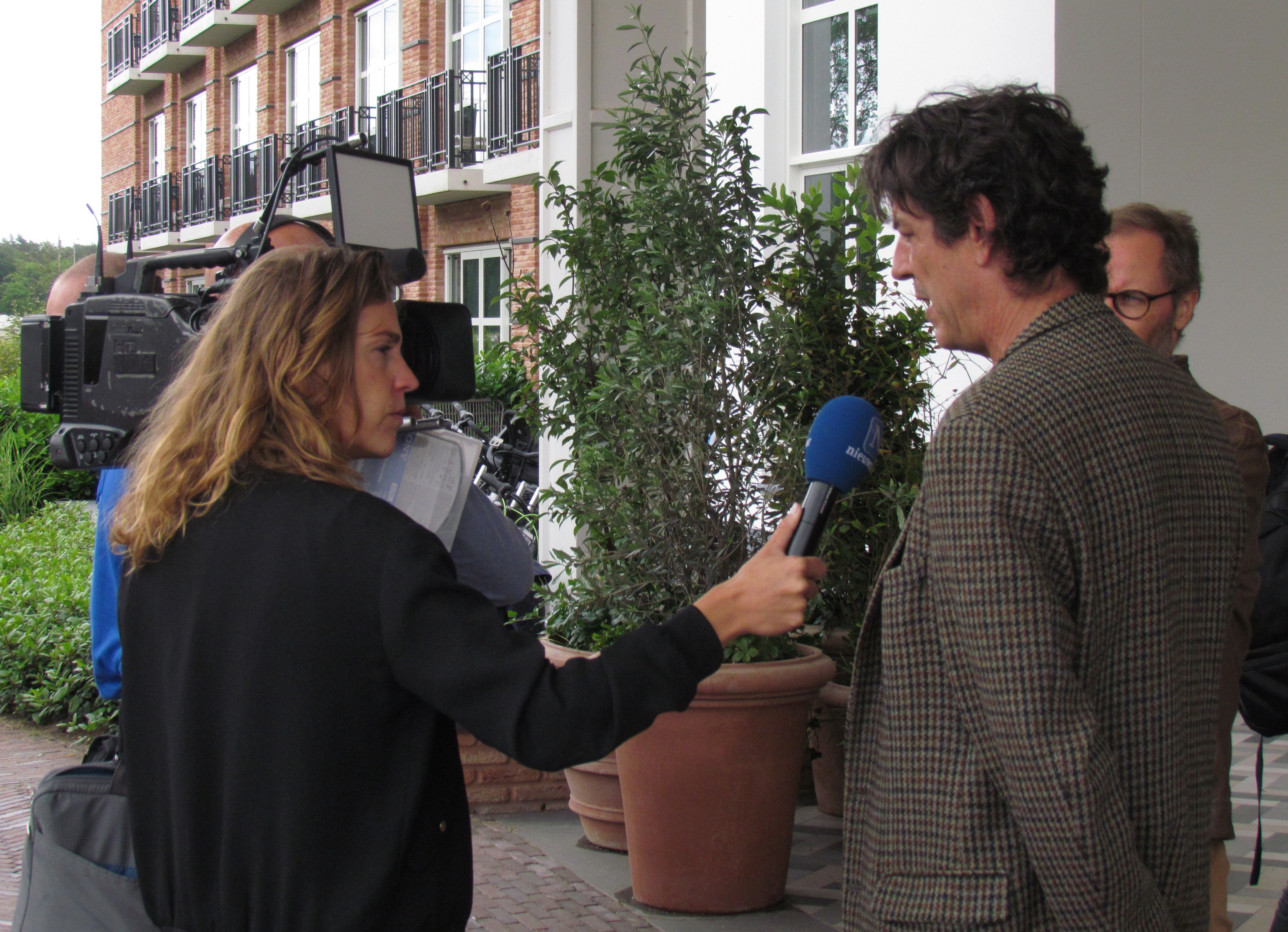 Een cameraploeg van Nieuwsuur interviewt voorman Peter den Haan van de sector Spoor van de FNV na een persconferentie waarin is bekendgemaakt dat het ledenparlement van de FNV heeft ingestemd met het pensioenakkoord tussen kabinet-Rutte III, werkgevers en vakbonden